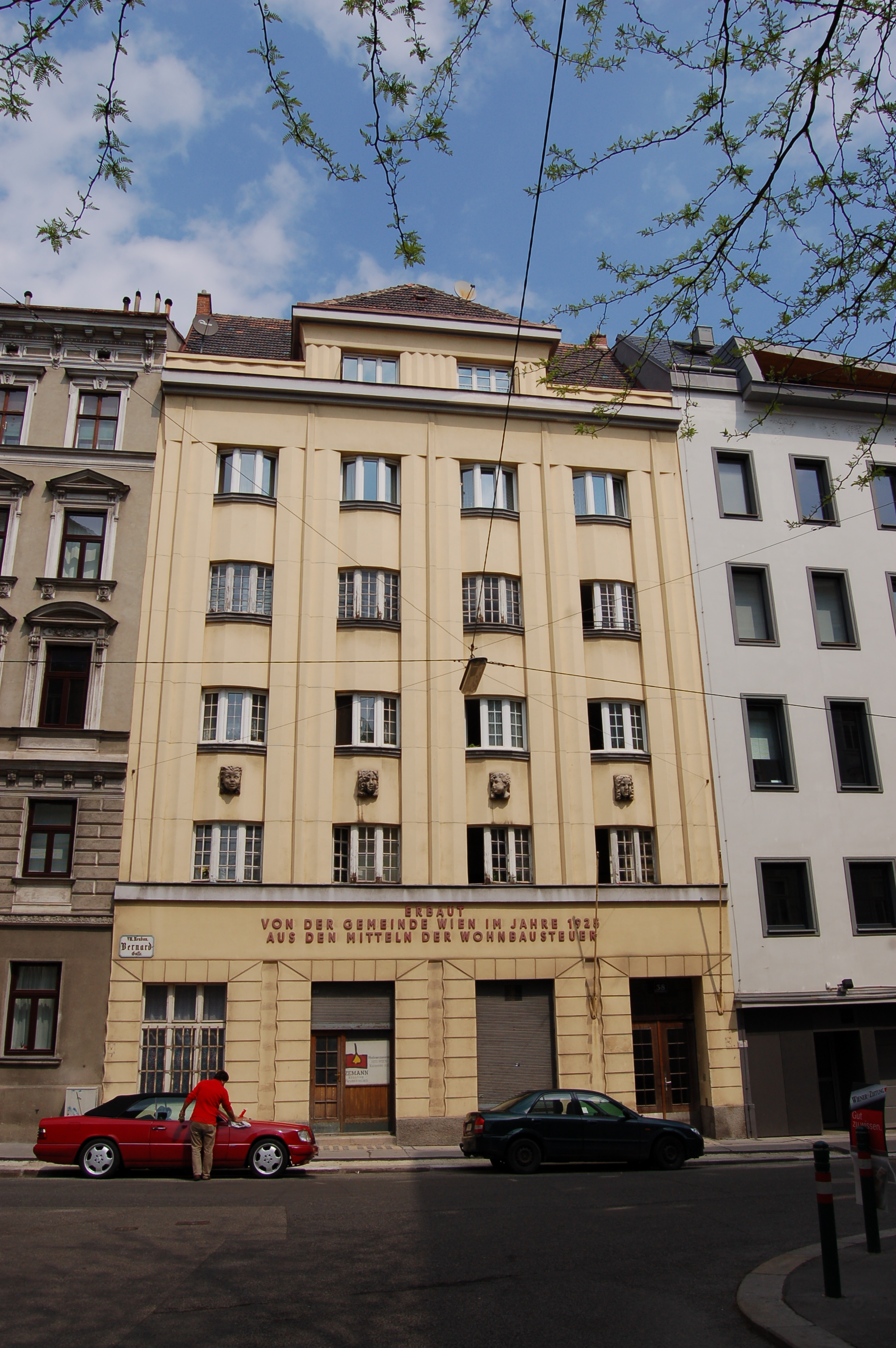 Die denkmalgeschützte Wohnhausanlage Bernardgasse 38 in Wien-Neubau. This media shows the Vienna residential building (Gemeindebau) with the ID 643.